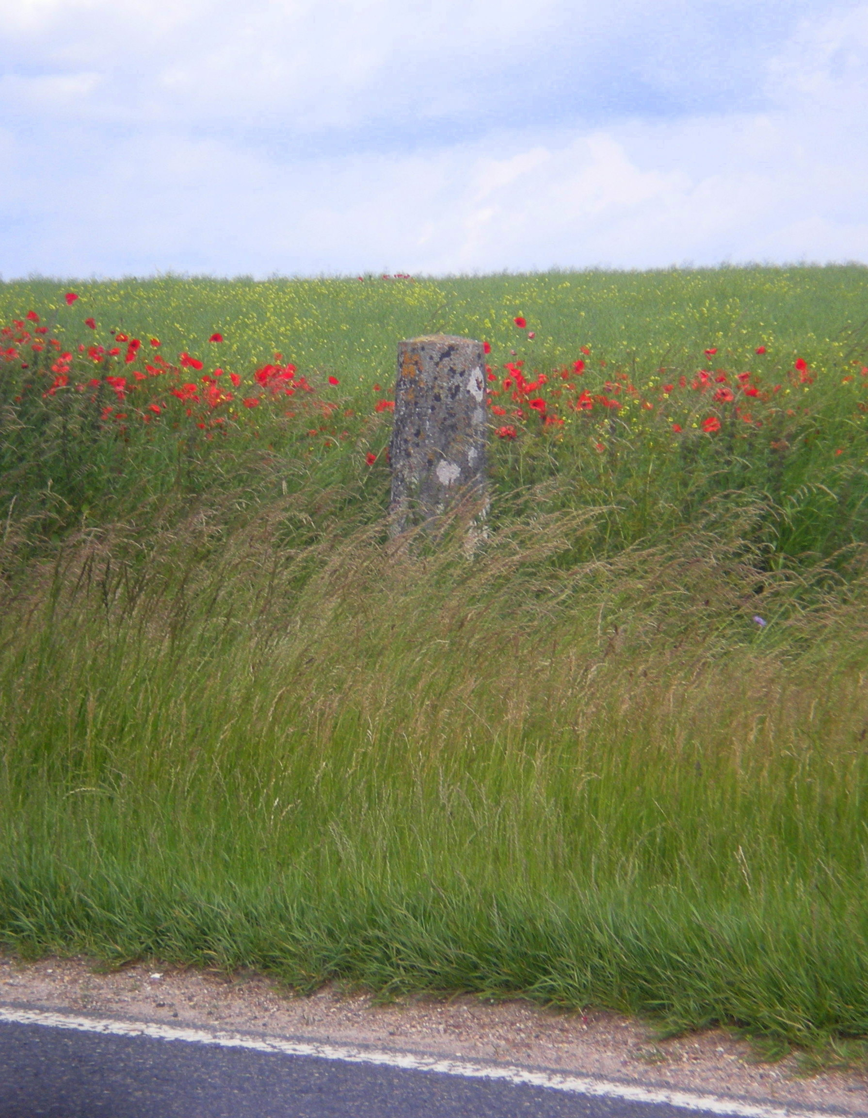 Ancienne borne de la route royale de Paris à Dunkerque le long de l'actuelle route départementale 916, commune d'Airion (60).